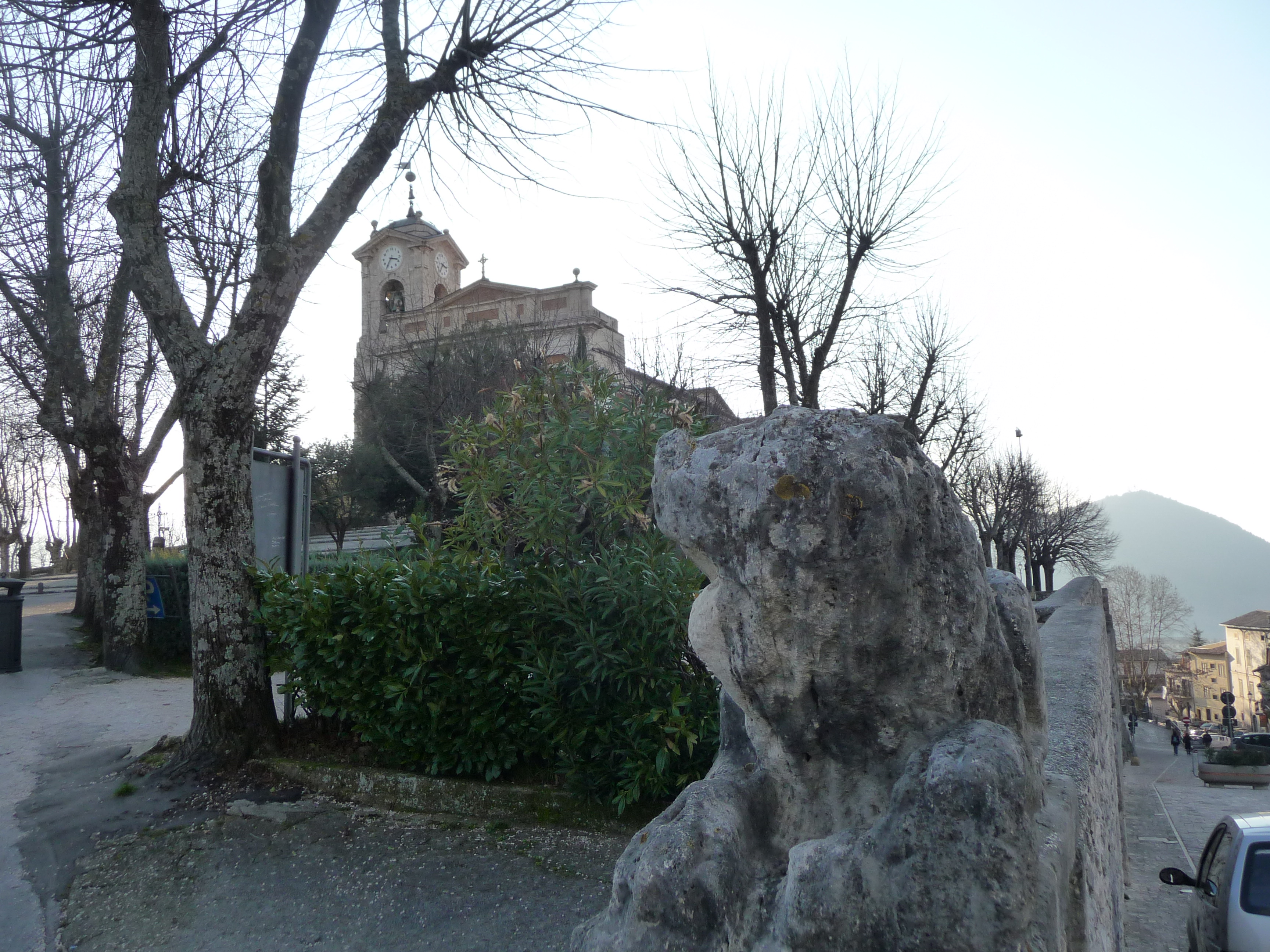 Il leone e la cattedrale